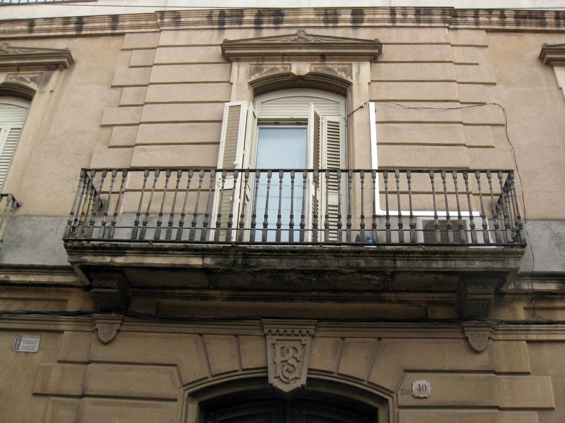 Casa Pasqual Sala, al carrer de Sant Quirze núm. 40 (Terrassa). Edifici eclèctic de Jeroni Granell (1877). Detall del balcó central, sota el qual es veu l'anagrama del propietari, PS.